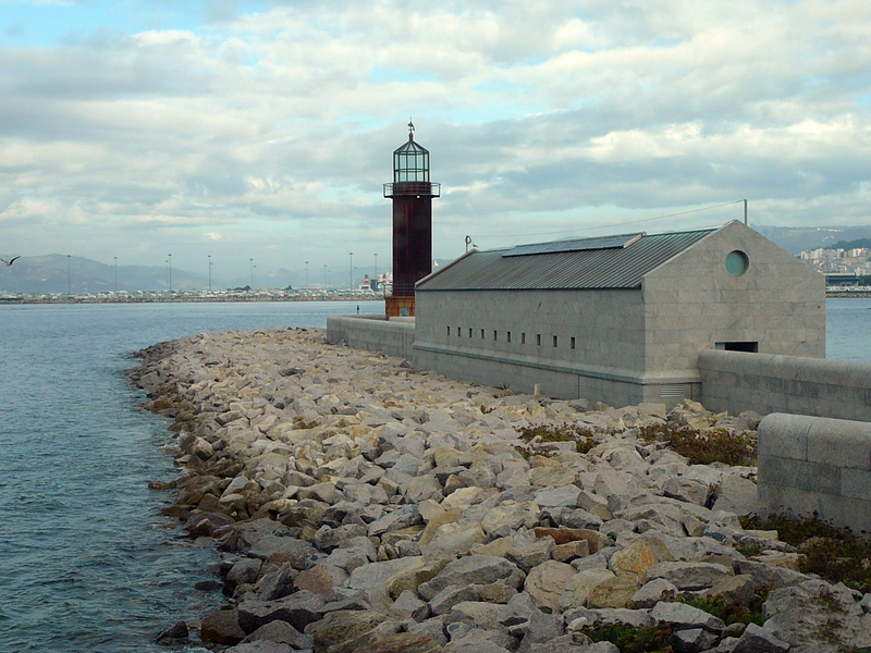 Alcabre, Vigo